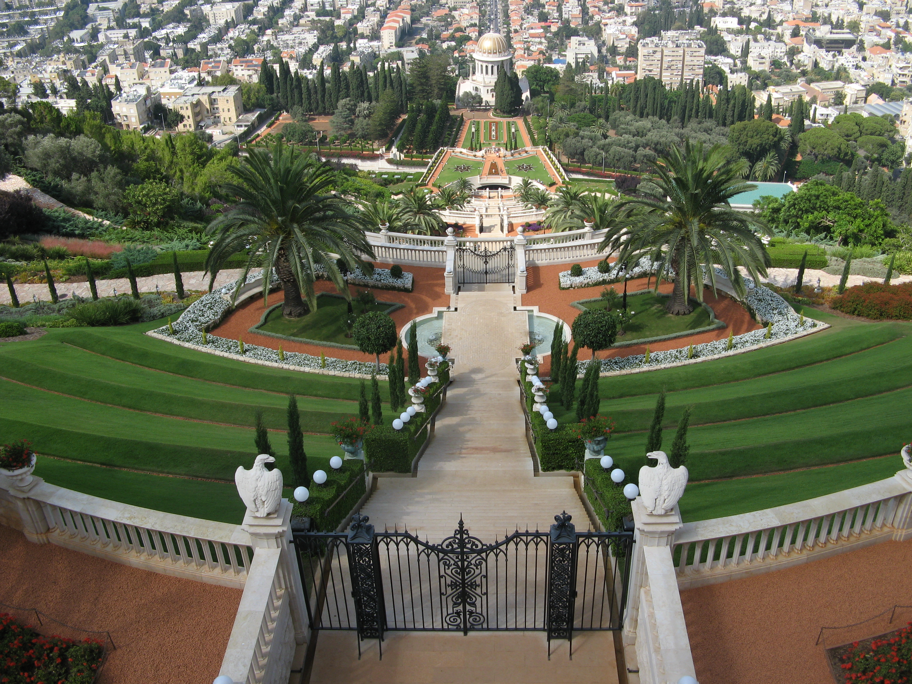 Baha'i gardens in Haifa, Israel